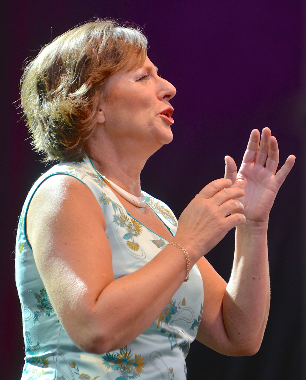 Lena Nordin på en konsert på Gustav Adolfs torg under Stockholms Kulturfestival den 17 augusti 2013.